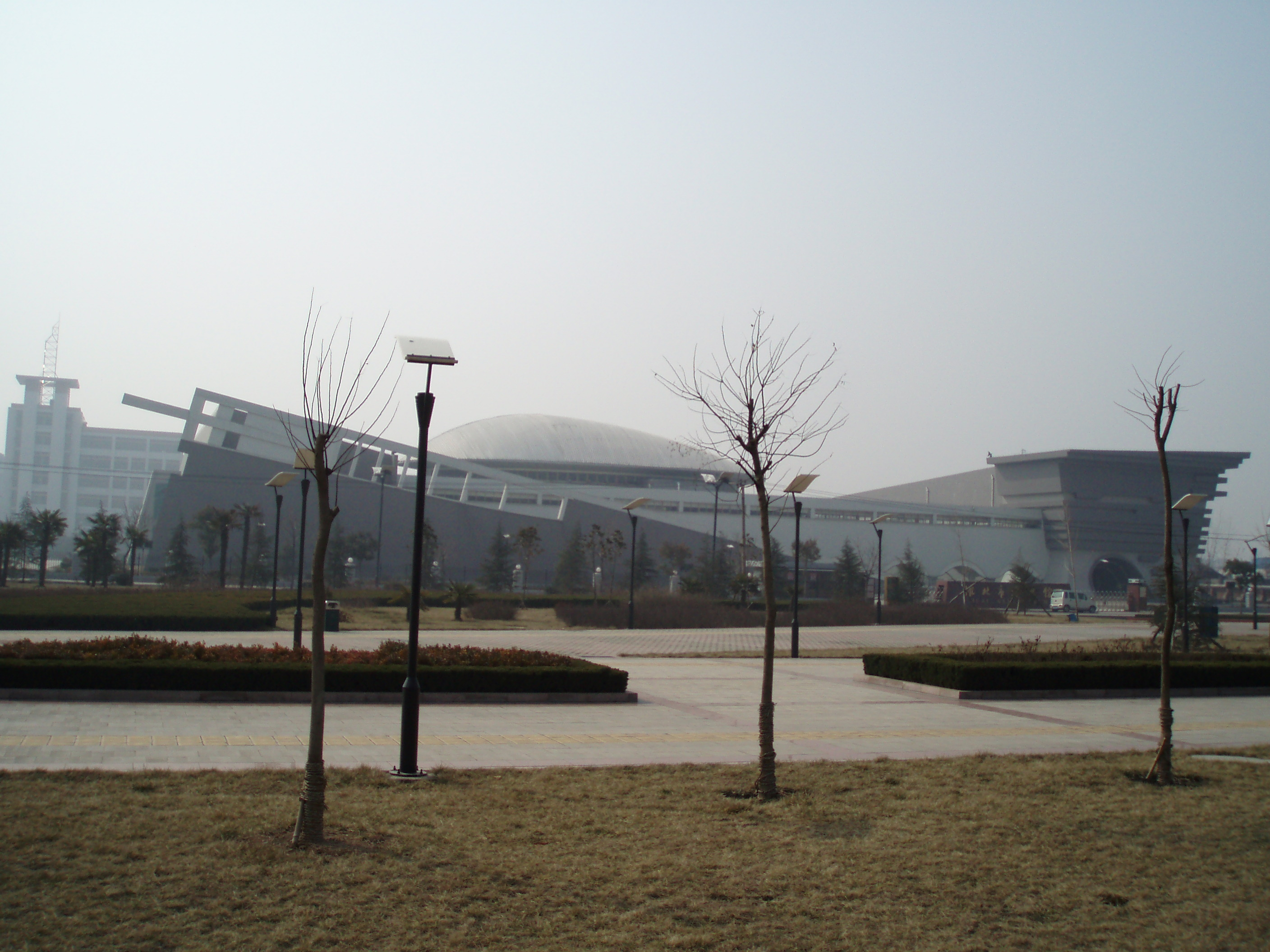 淮北市博物馆